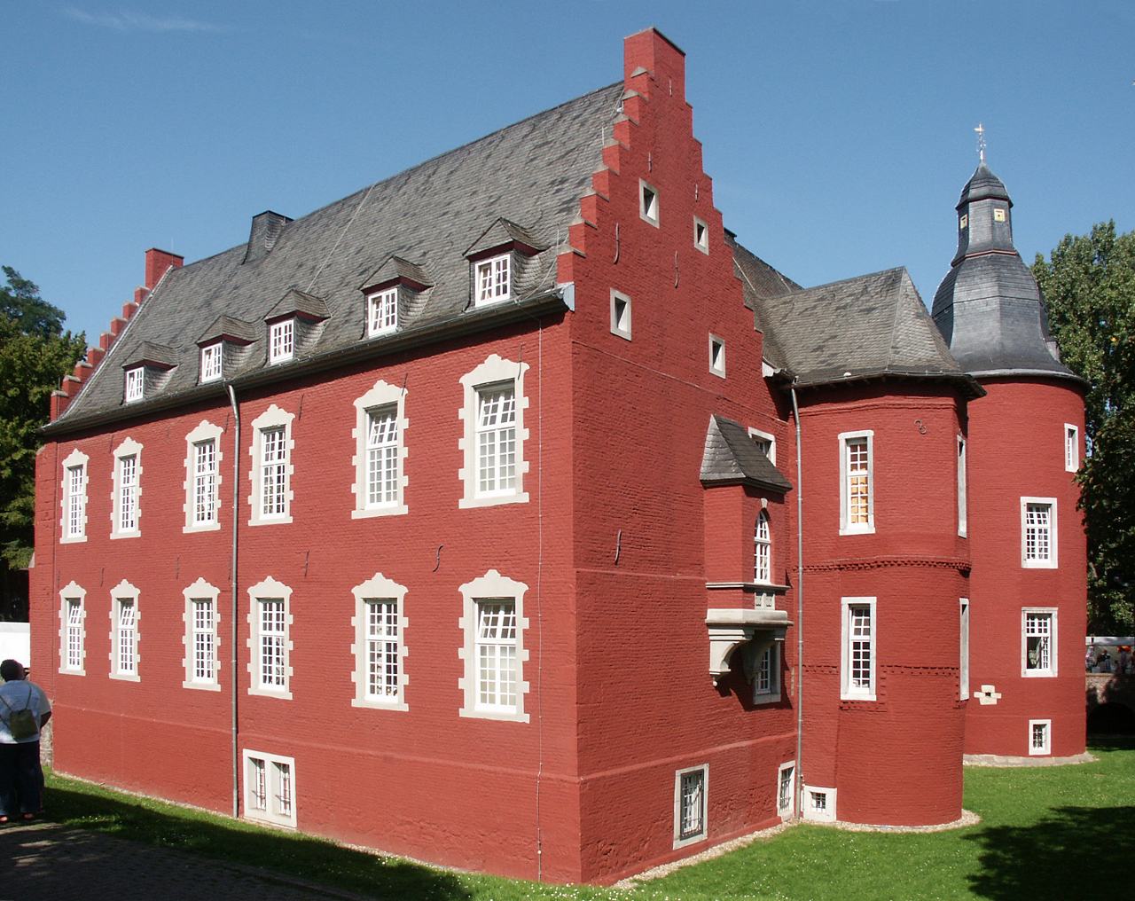 Infos zur Burg gibt es in der Wikipedia.